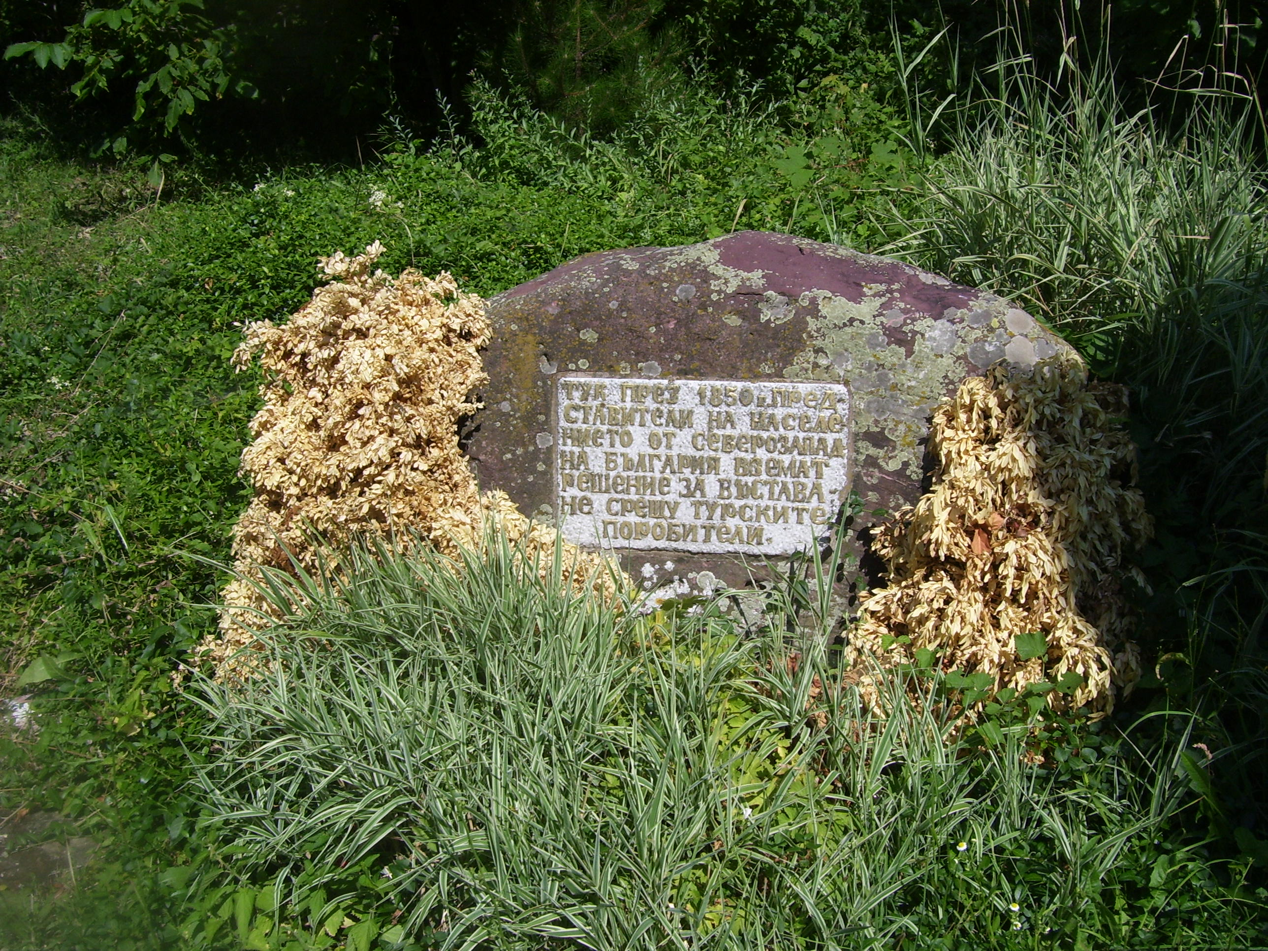 Паметна плоча за избухването на въстанието от 1850 година в Раковишкия манастир, България.